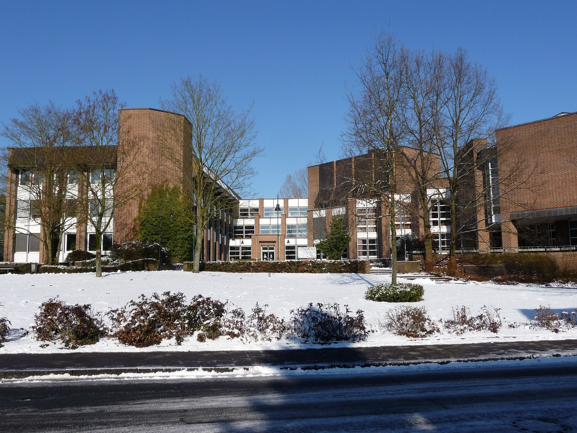 Das Rathaus von Steinfurt. (Emsdettener Straße 40, 48565 Steinfurt (Borghorst))